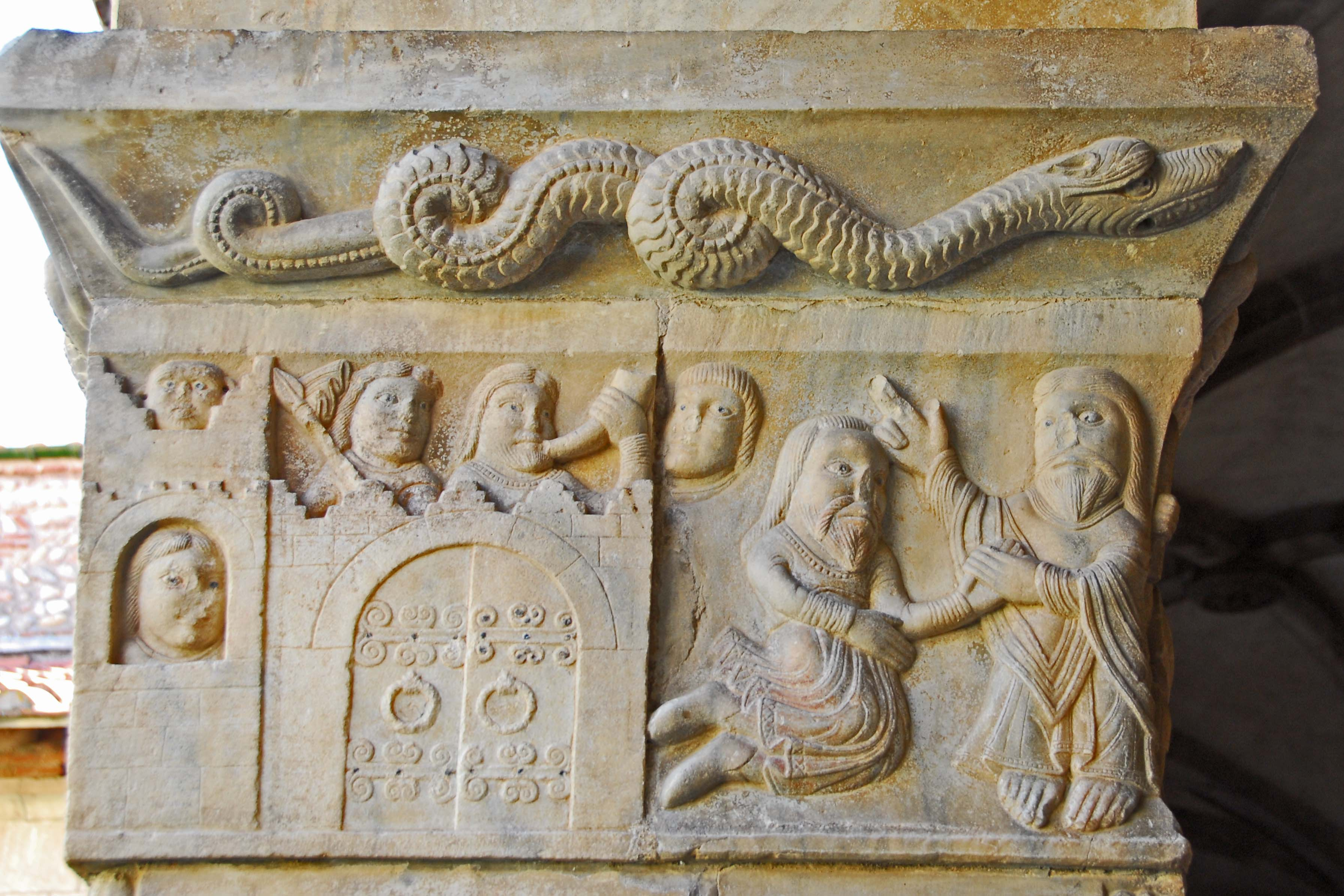 Ste-Eulalie-et-Ste-Julie_d’Elne, Pfeilerkapitell Südgalerie, "Quo vadis?" vor Rom